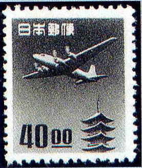 日本で国内航空郵便用として発行された40円切手。描かれているのはDC-4型旅客機と五重塔である